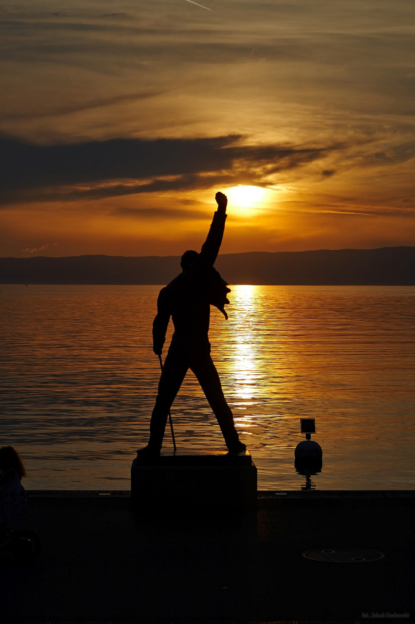 copyright foto: Jakub Kozlowski